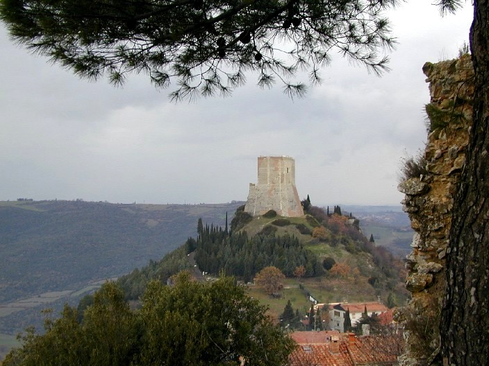 Castiglione d'Orcia Foto scattata da me il 28 dicembre 2003